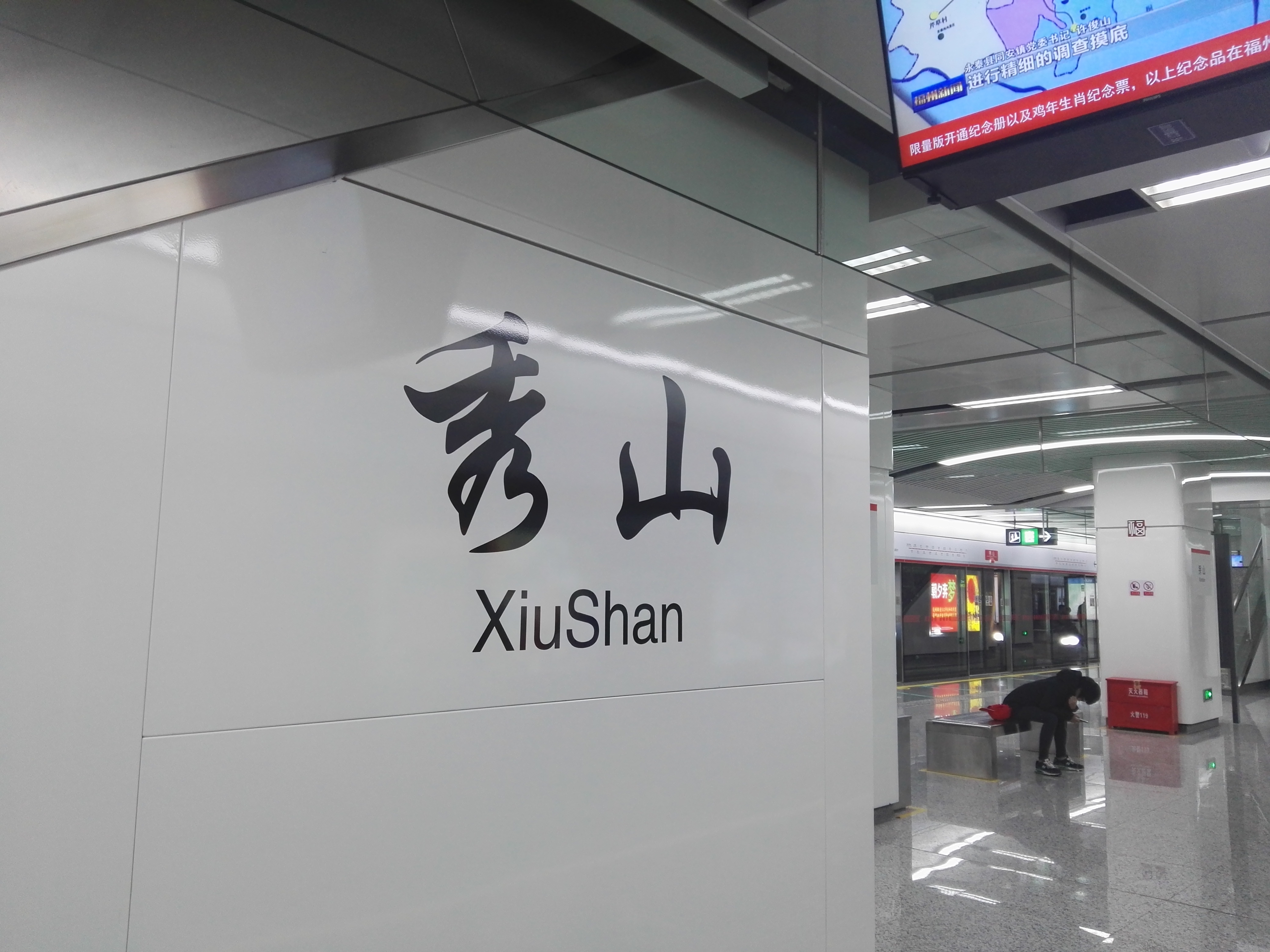 中文（中国大陆）: 秀山站大字壁